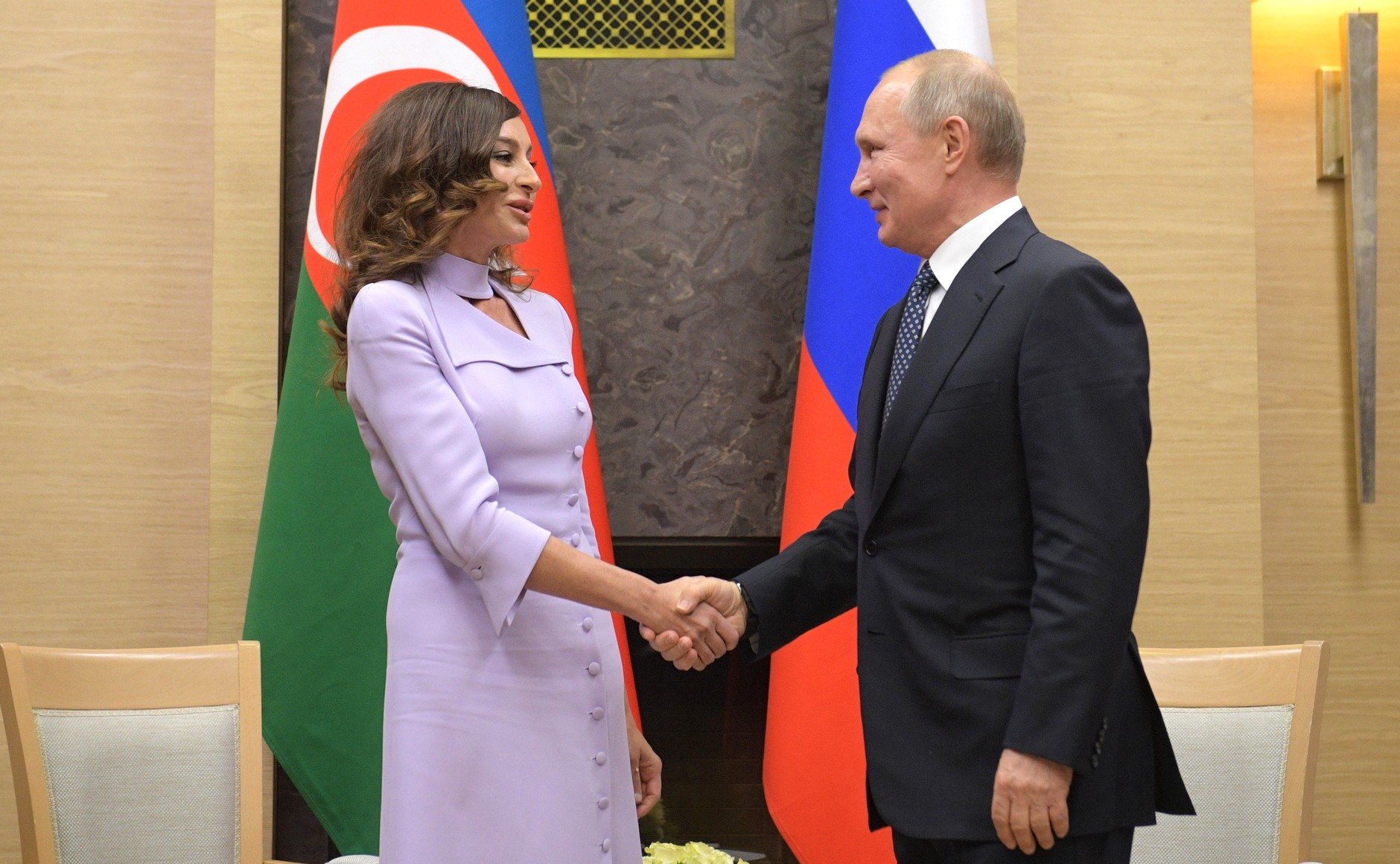 Президент России Владимир Путин с Первым вице-президентом Азербайджана Мехрибан Алиевой